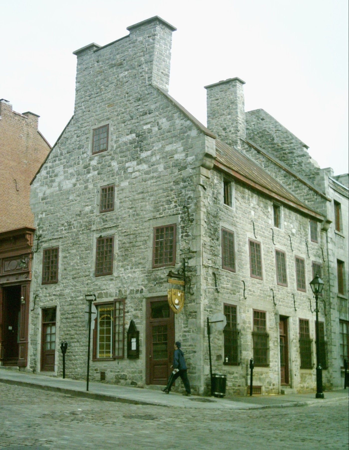 La Maison Pierre du Calvet, située au 411 rue Saint-Paul Est à Montréal